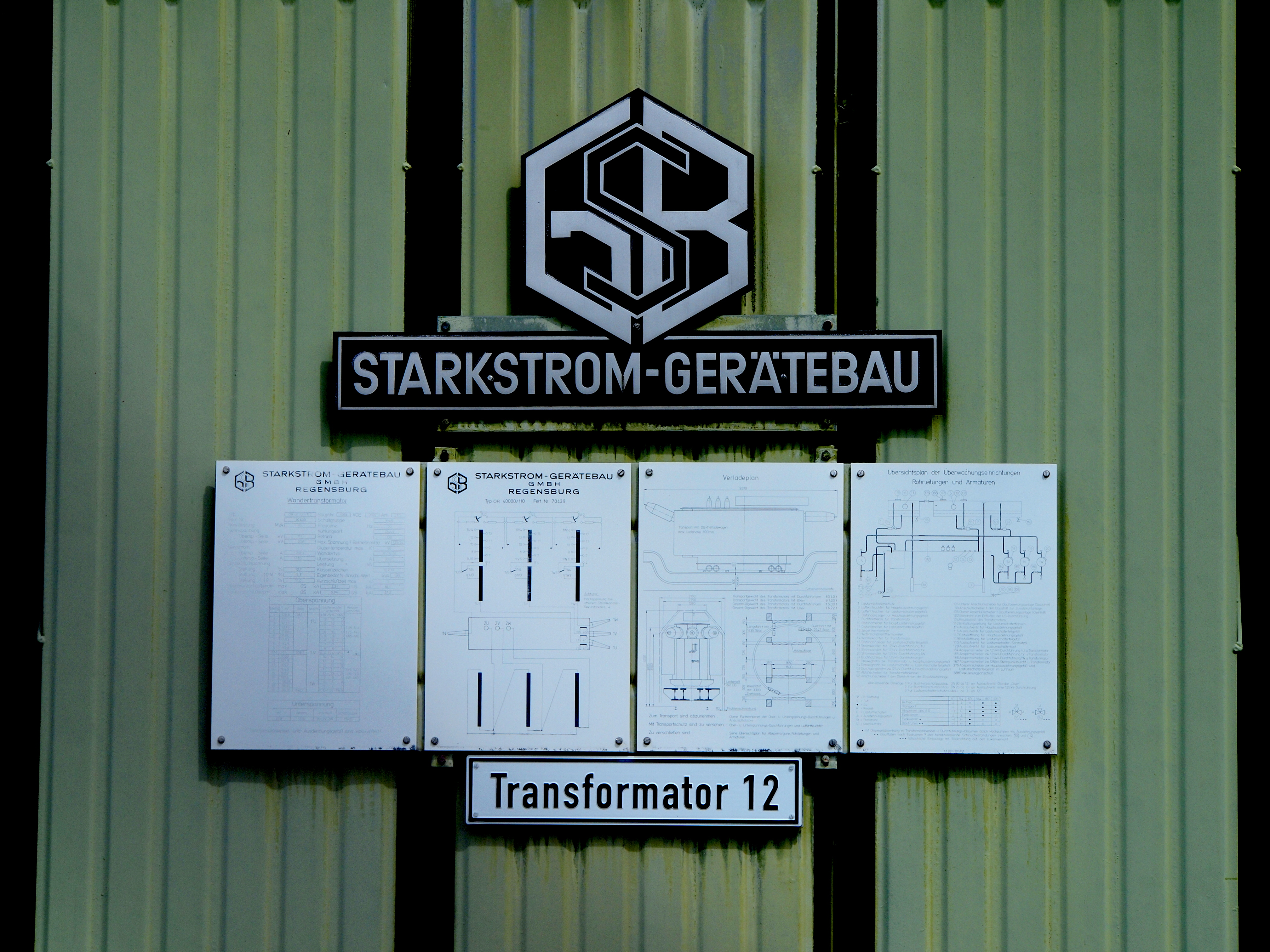 Schemabild und Beschilderung Transformator 12 im Umspannwerk Nr. 730 in Leinau, Gemeinde Pforzen. Das Umspannwerk ist eines von zwei Umspannwerken, welche die Stadt Kaufbeuren mit Strom versorgen. Trafo Nr. 12: Starkstrom Gerätebau, 40 MVA, 110kV/10KV, Baujahr 1984